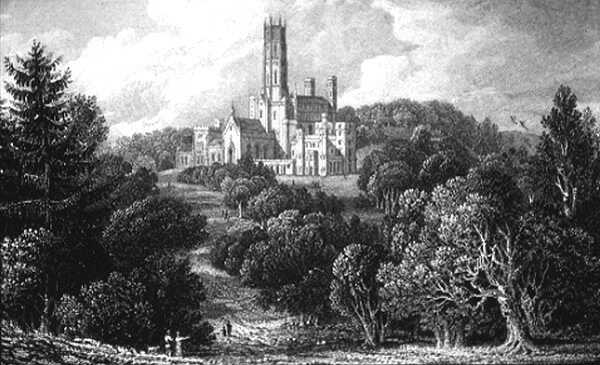 Fonthill Abbey, propriedade que pertenceu ao escritor William Beckford. A gravura, do sÃ©culo XVIII, foi desenhada por John Britton e pode ser encontrada em Graphical and Literary Illustrations of Fonthill Abbey (London, 1823). Original estÃ¡ na Beinecke Library, Yale University (imagem encontada na internet), disponÃ­vel em: (sÃ­tio de origem desta imagem) e